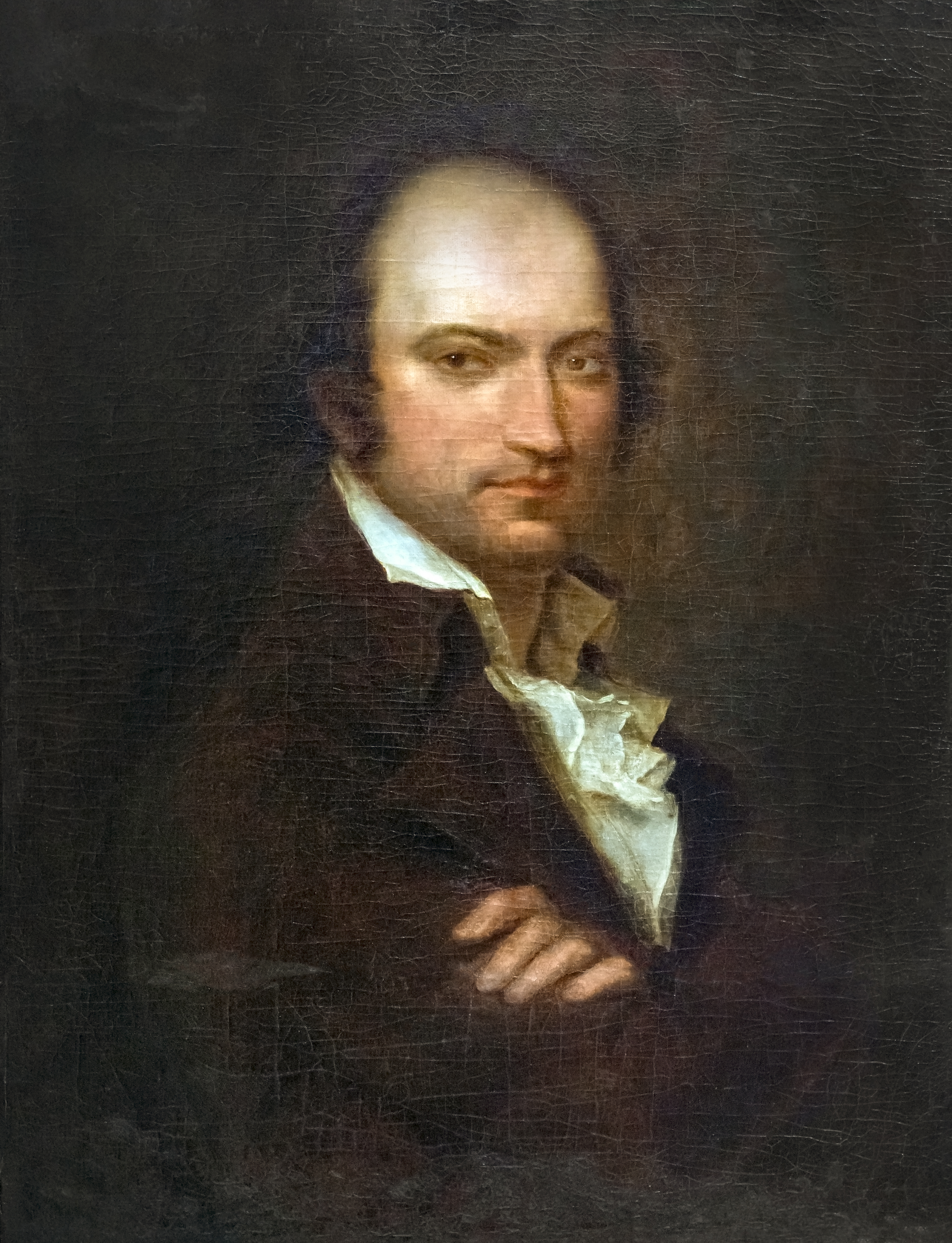 Depicted person: André Chénier – French poet